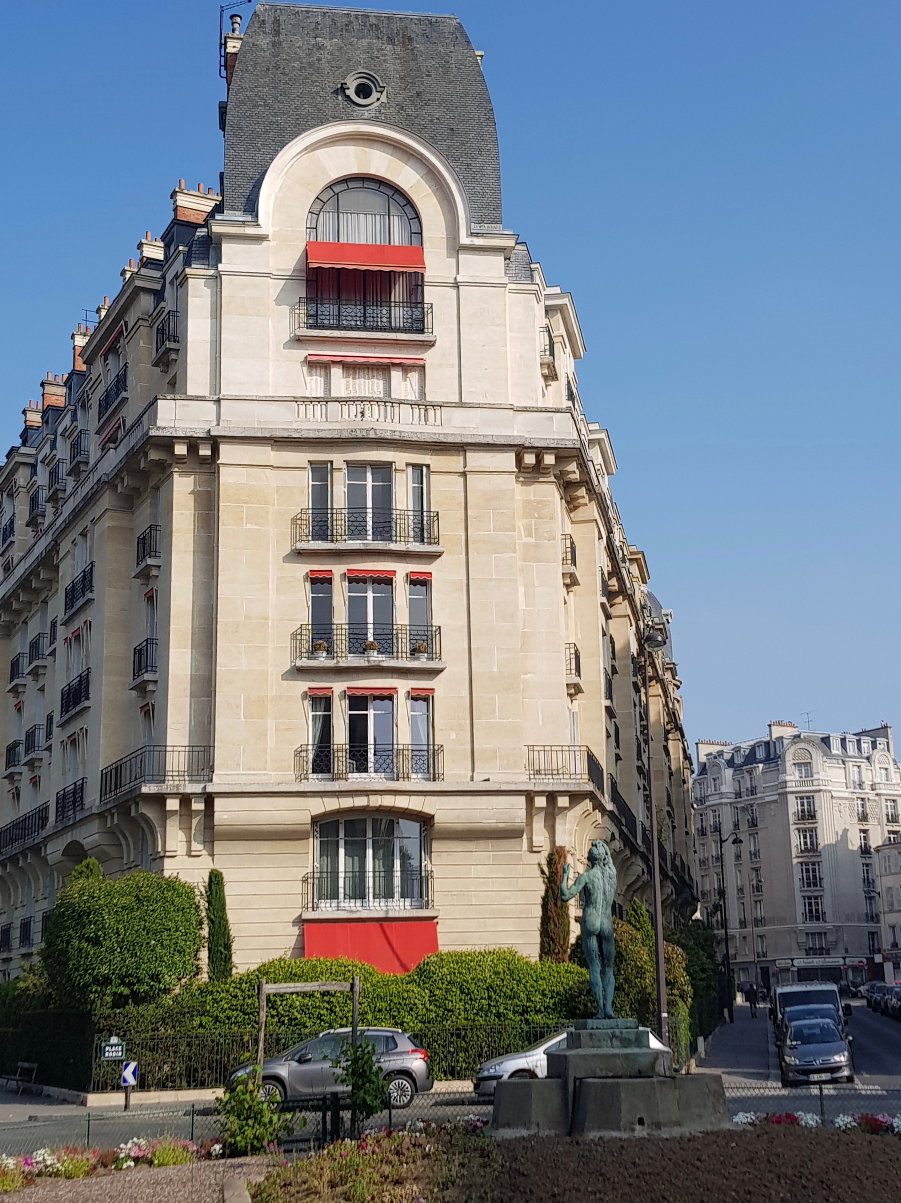 Place Rodin, Paris 16e.